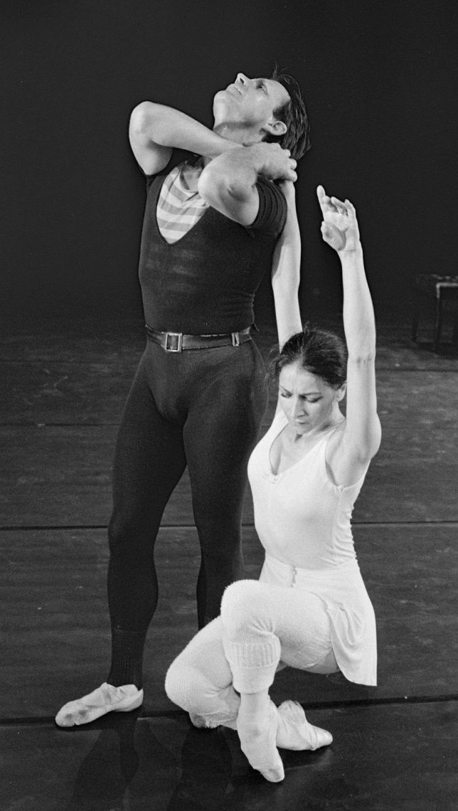 Alexandra Radius en Han Ebbelaar 25 jaar danspaar; tijdens repetities (duet voor Ballet en Muziek) in de Koninklijke Schouwburg